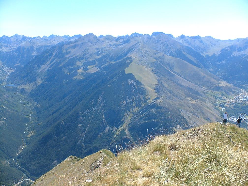 Serra de Llats vista des de l'Aüt; la Vall de Boí, Alta Ribagorça, Catalunya